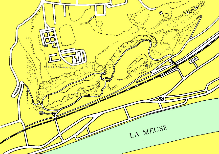 Carte des sentiers de la réserve "Aux Roches" à Chockier (Flémalle). Archives : Etudes & Environnement asbl